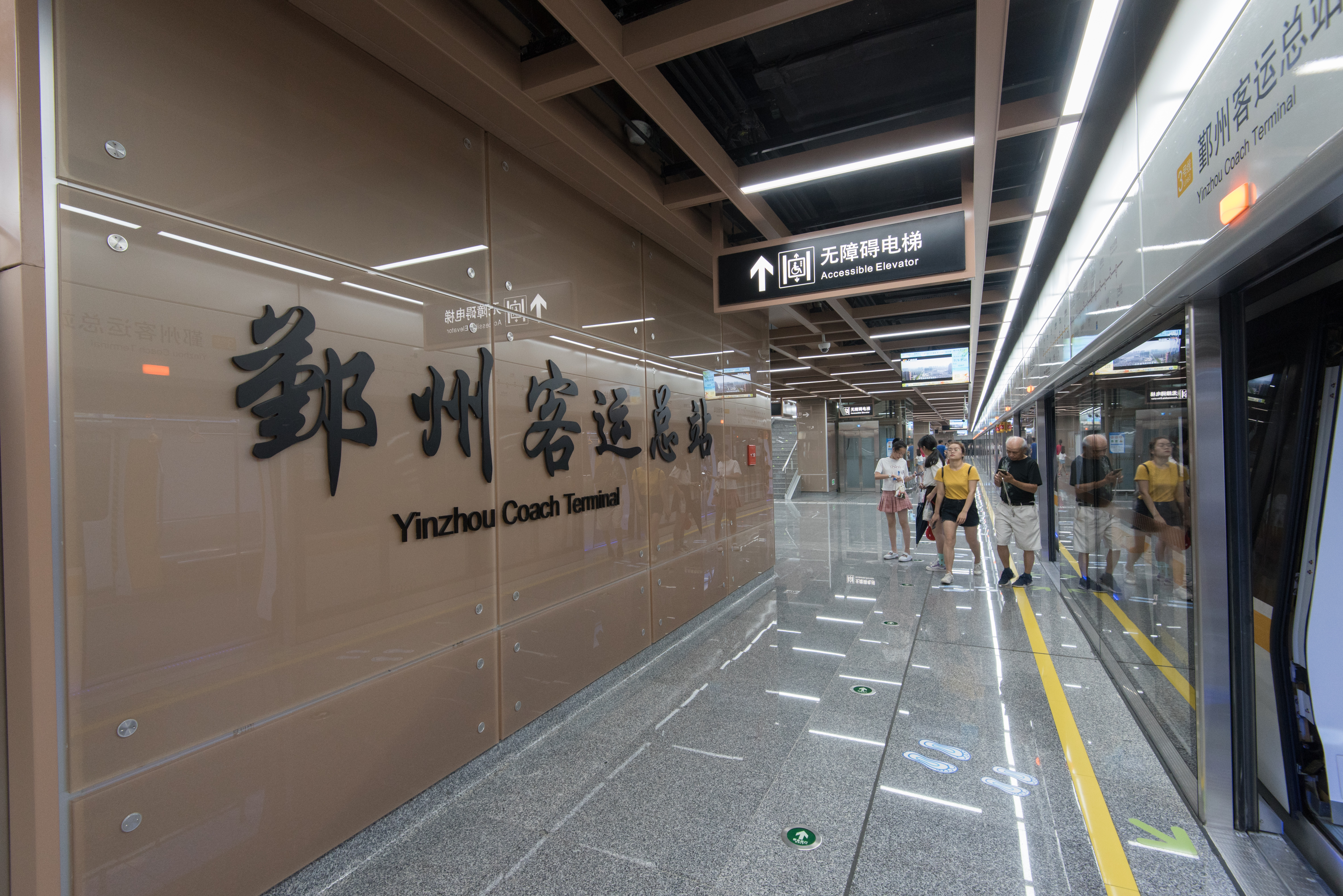 宁波地铁鄞州客运总站